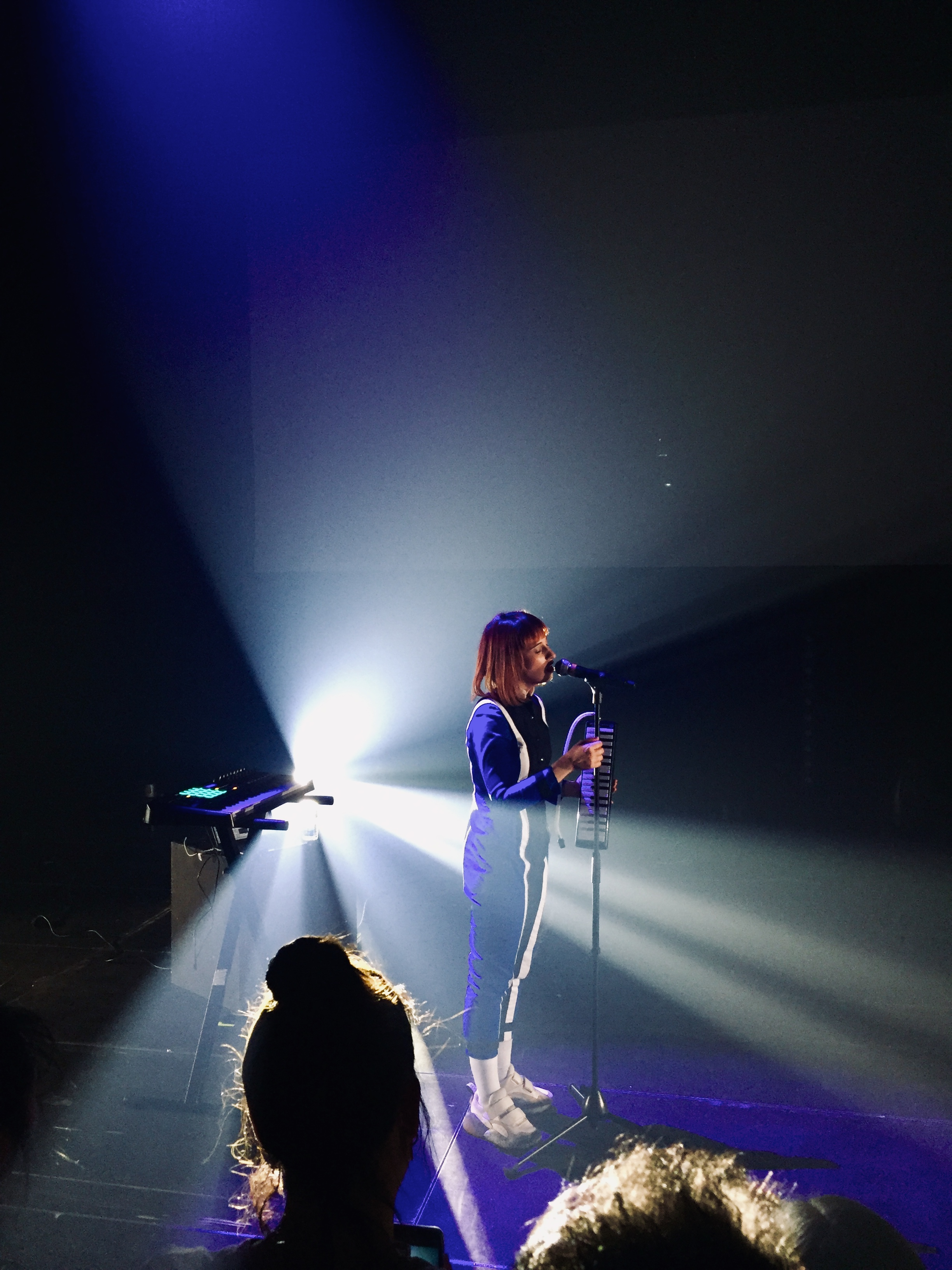 Suzane au Oooh festival à Mons en Barœul